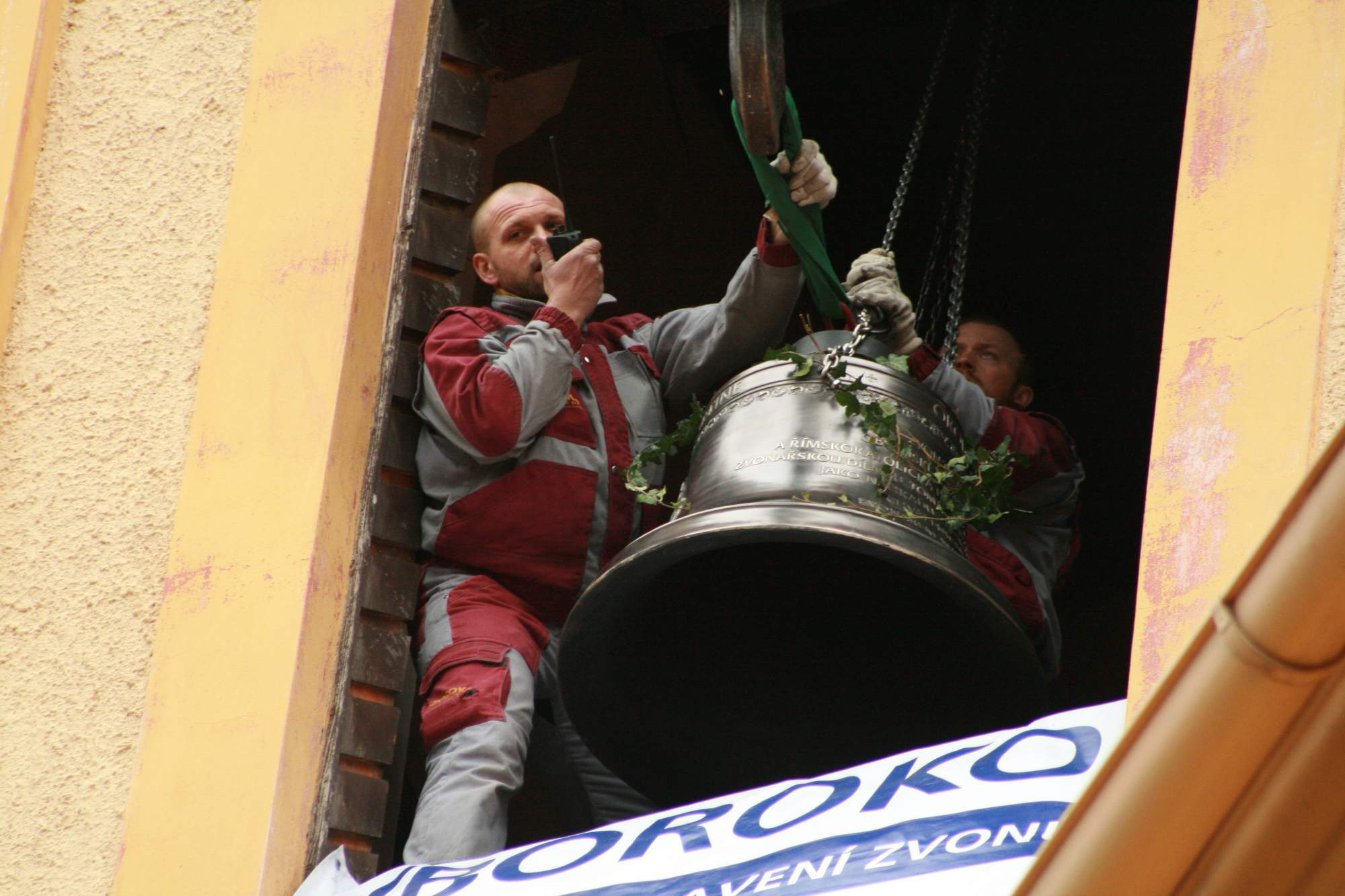 Umístění zvonu Martin